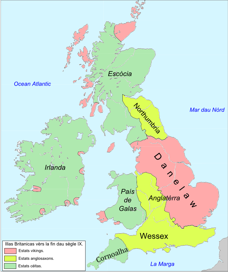 Illas Britanicas vèrs la fin dau sègle IX.